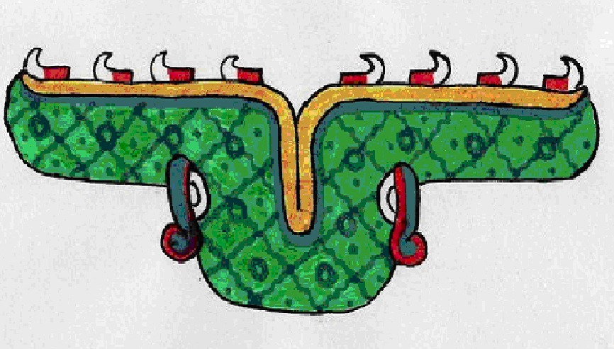 Dibujado en base al Códice Borgia